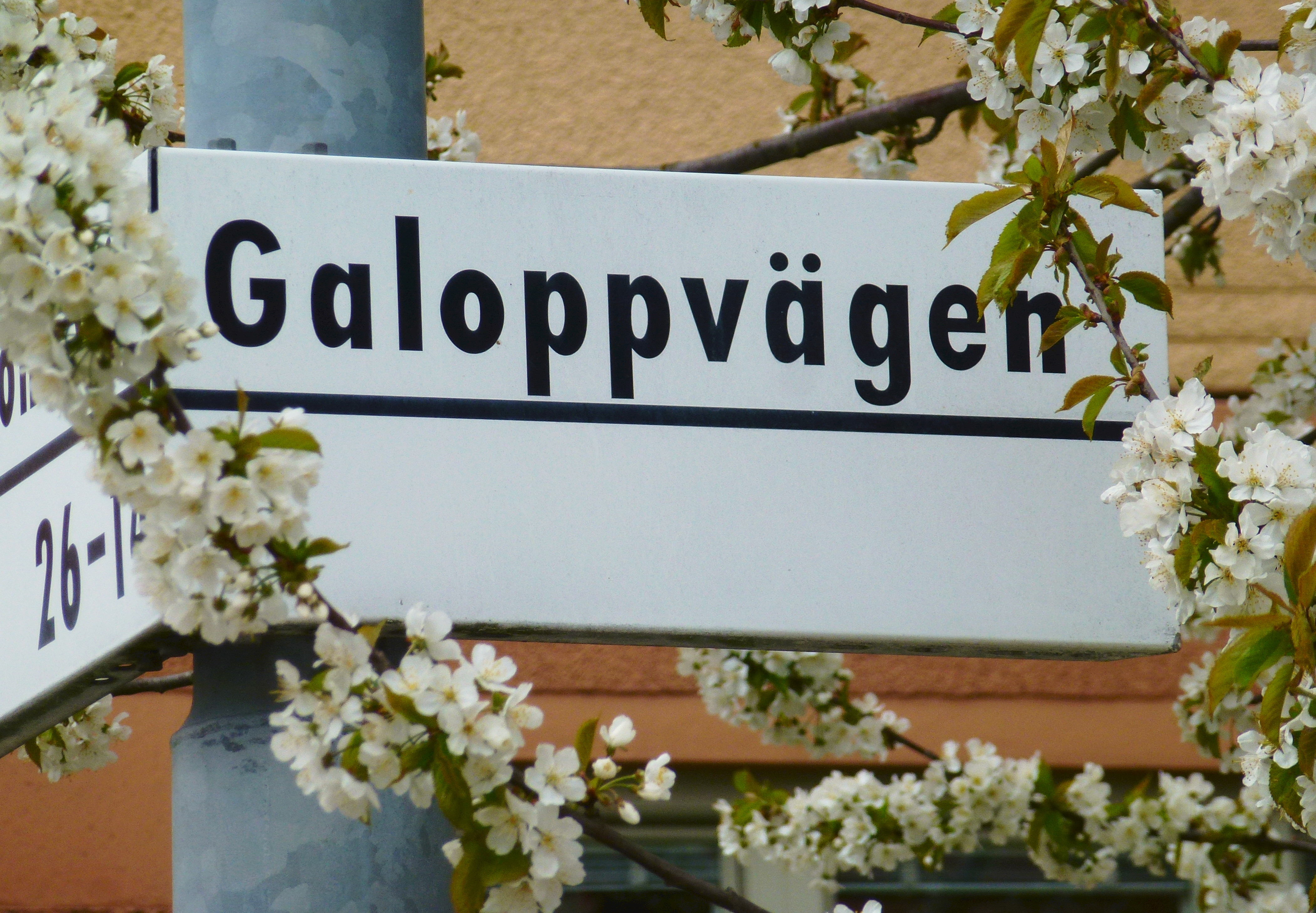 Galoppvägen, Solna påminner om Ulriksdals galoppbana